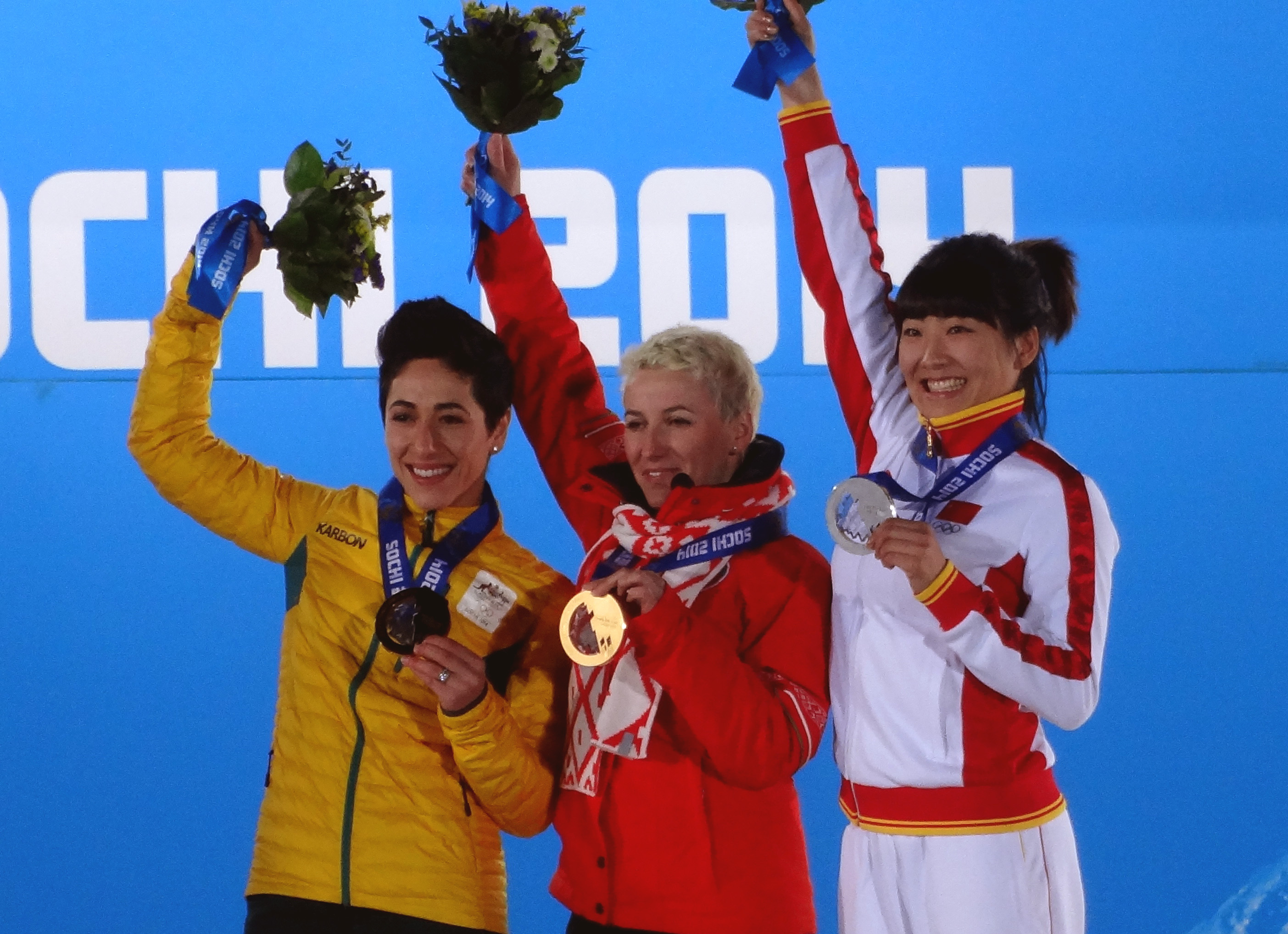 Церемония награждения состоялась 15 февраля на Медальной площади в Сочи. Призеры XXII зимних Олимпийских игр в Сочи: 1. Алла Цупер (Беларусь) 2. Сю Ментао (Китай) 3. Лидия Лассила (Австралия).